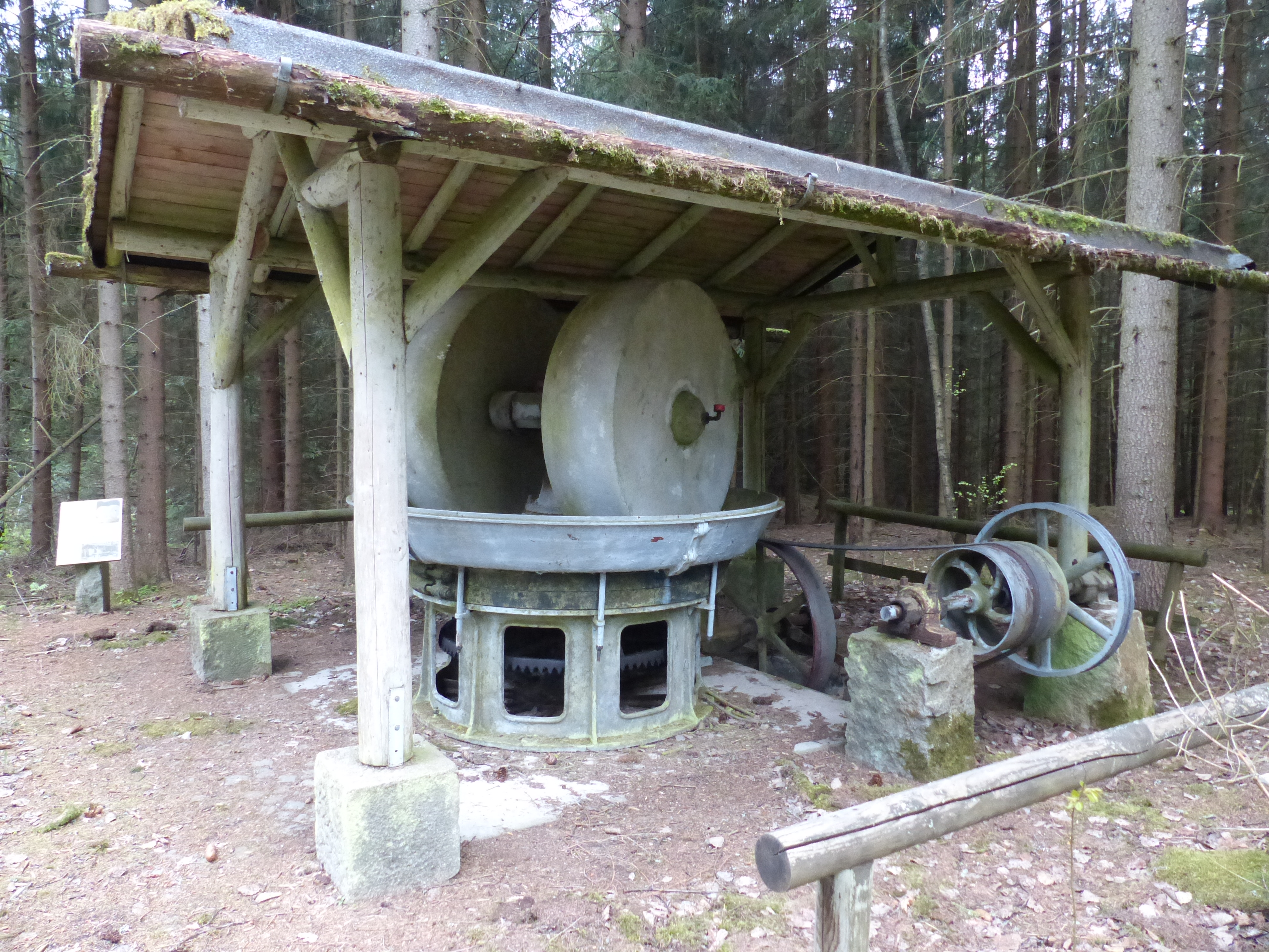 Schausteinbruch Häusellohe bei Selb